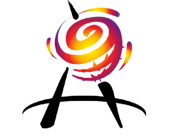 Logotipo de Antena Latina entre 1999 y 2002.